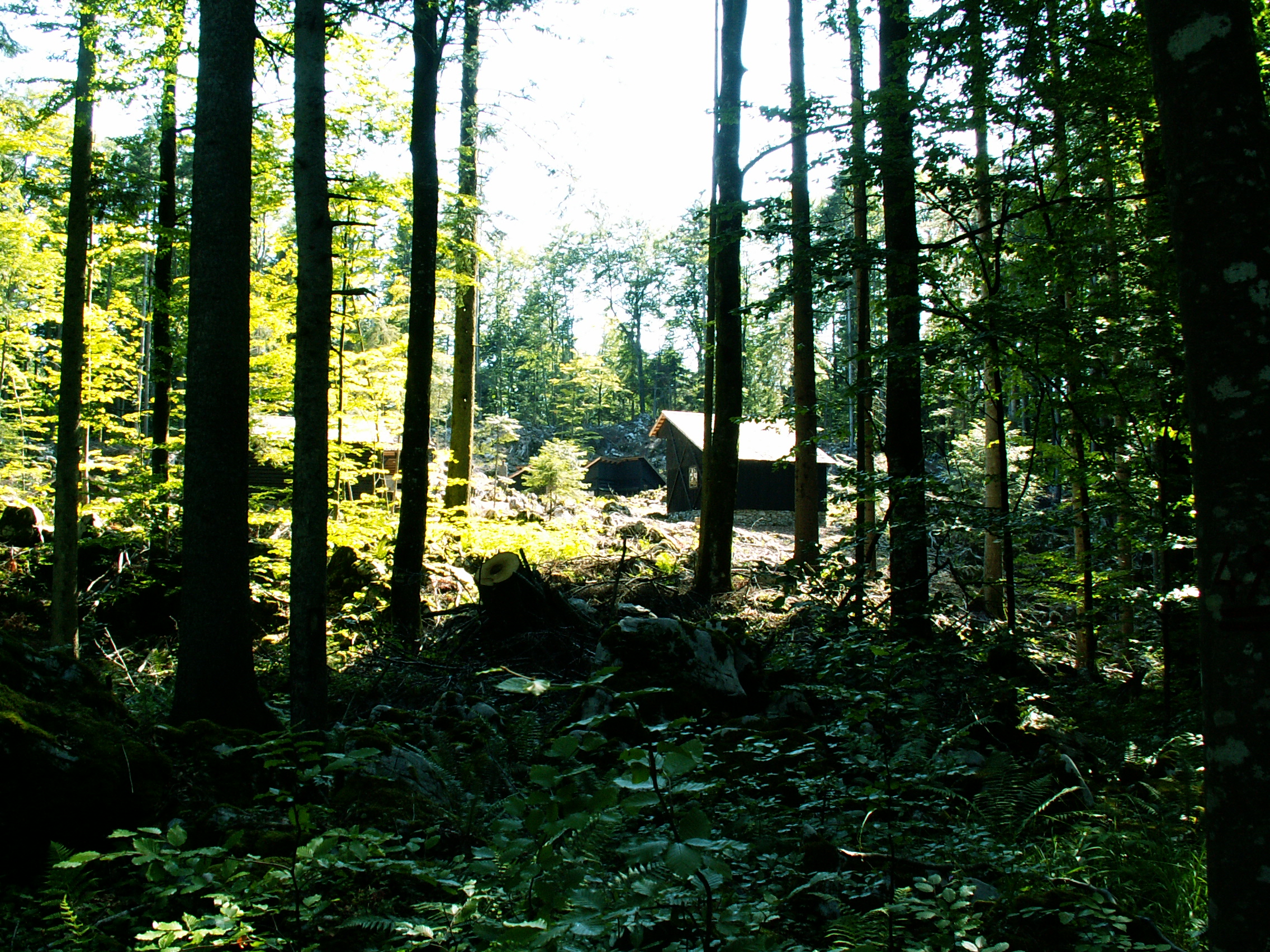 Partisan hospital Zgornji Hrastnik in Kočevski Rog, Slovenia